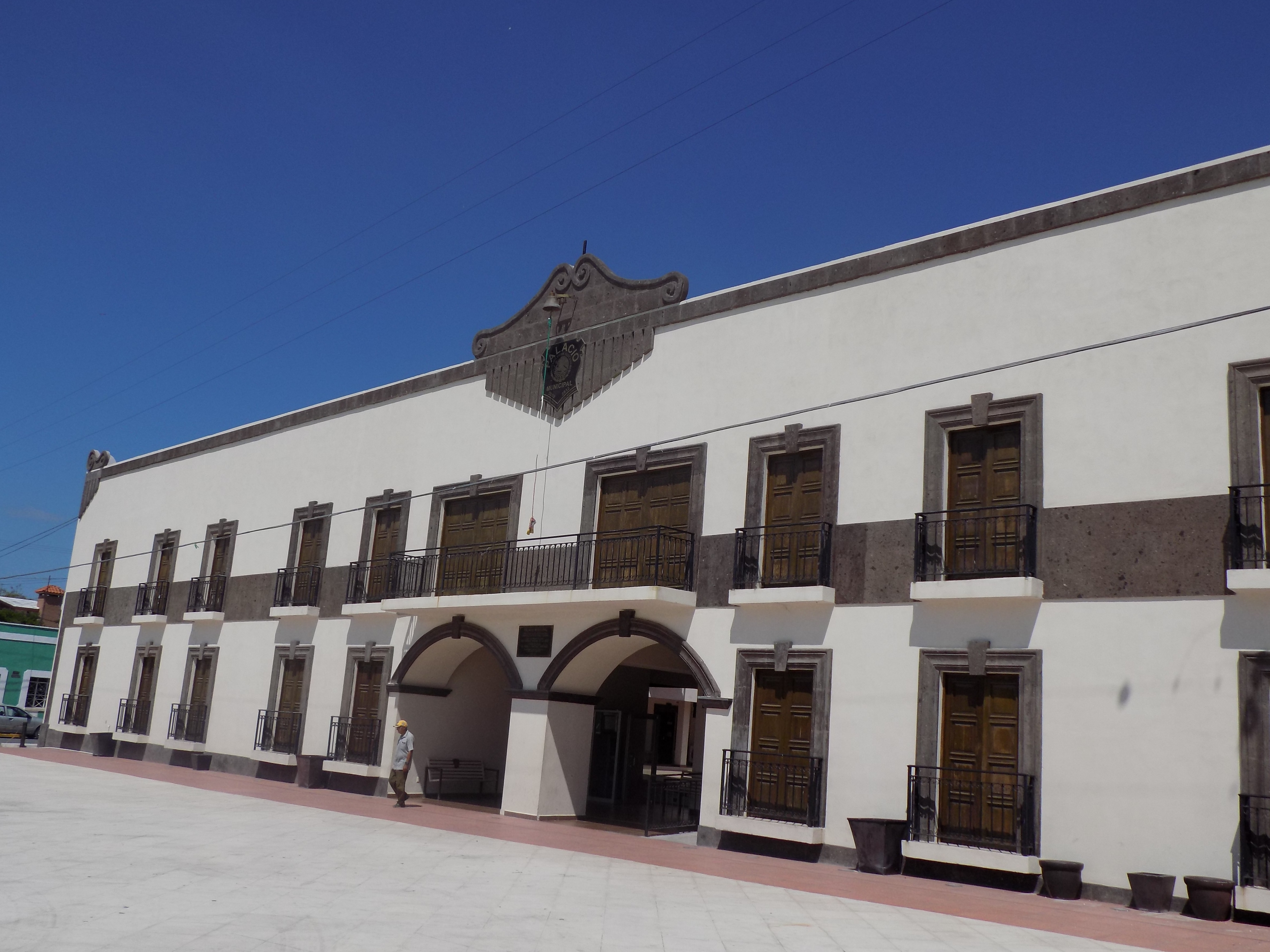 PALACIO MUNICIPAL DE ZUAZUA NL